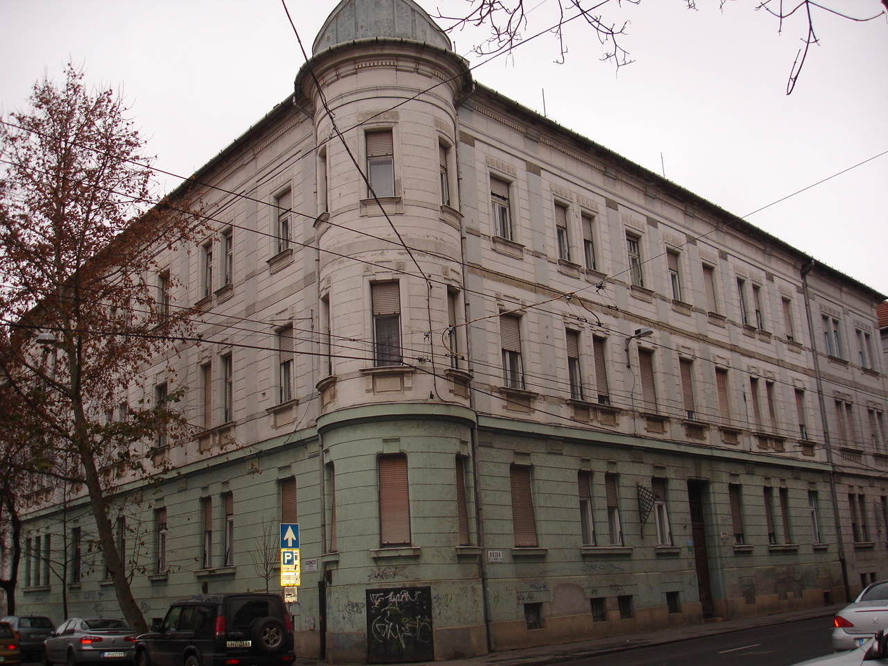 Erdélyi és Kopasz palota, Szeged Dózsa György utca 9. Kopasz Márta szülőháza. Tervezte: Kopasz István, 1910.